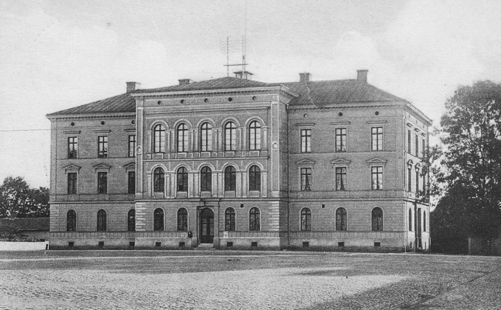 Mariestads stadshotell innan ytbyggnad